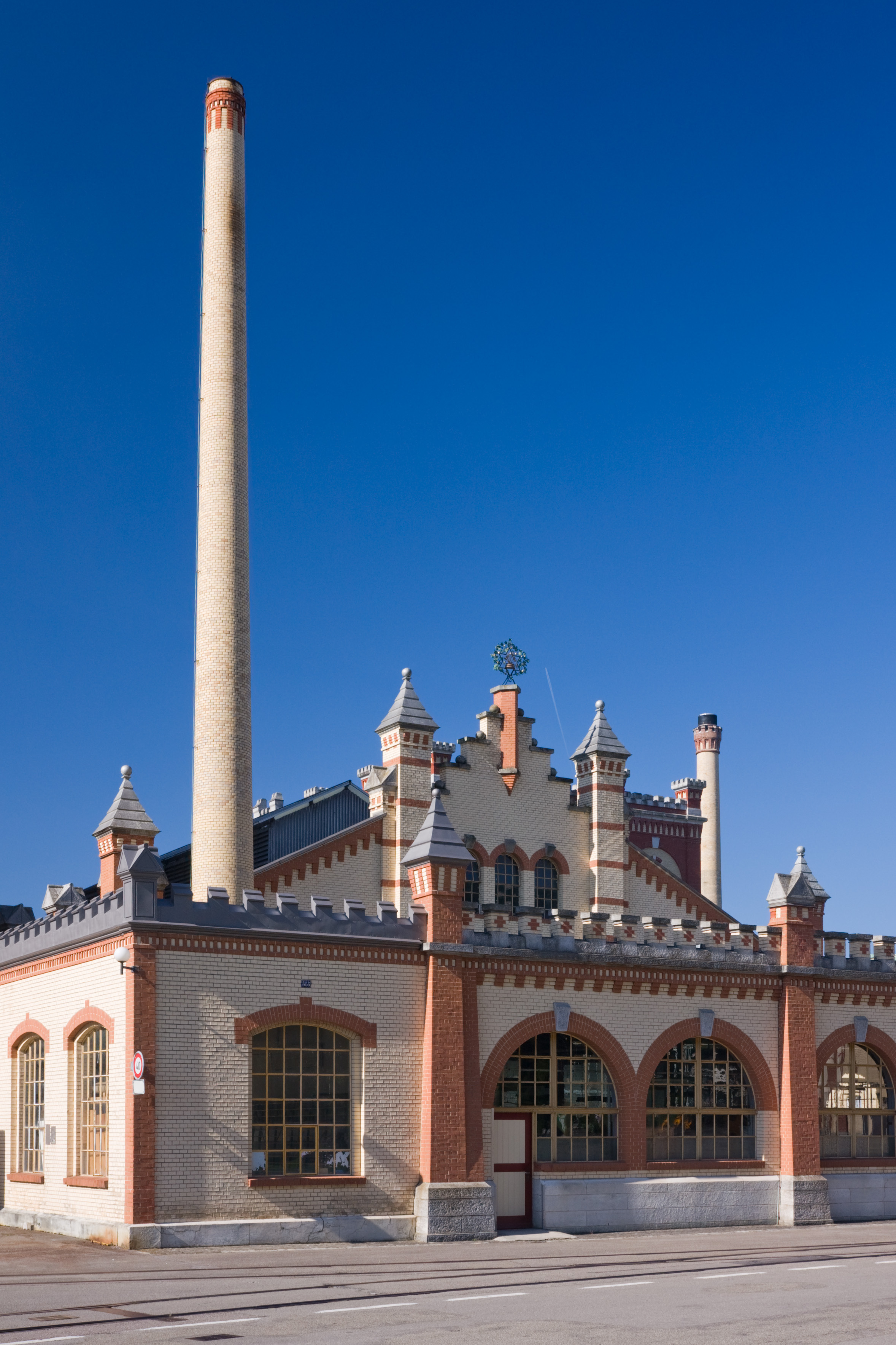 Detailaufnahme der Feldschlösschen-Brauerei in Rheinfelden